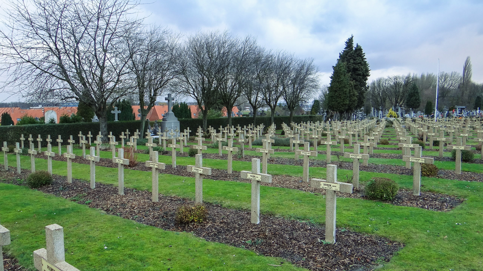 Valenciennes (St. Roche) Communal Cemetery